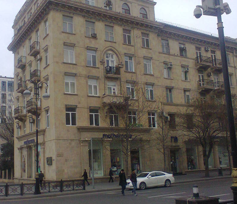 В этом доме жил Джахангир Зейналов